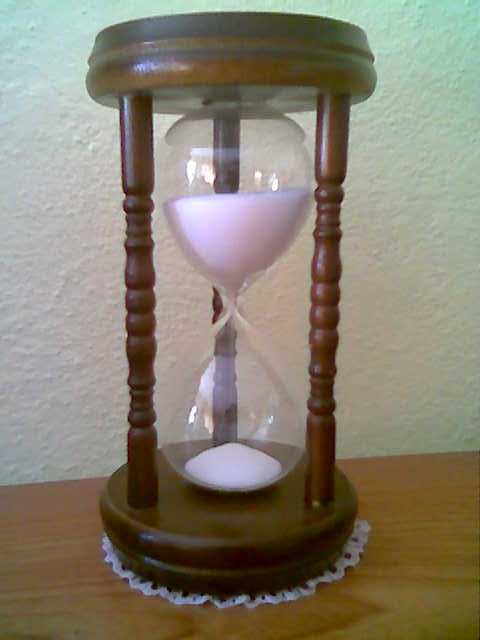 Reloj de arena de 15 minutos.